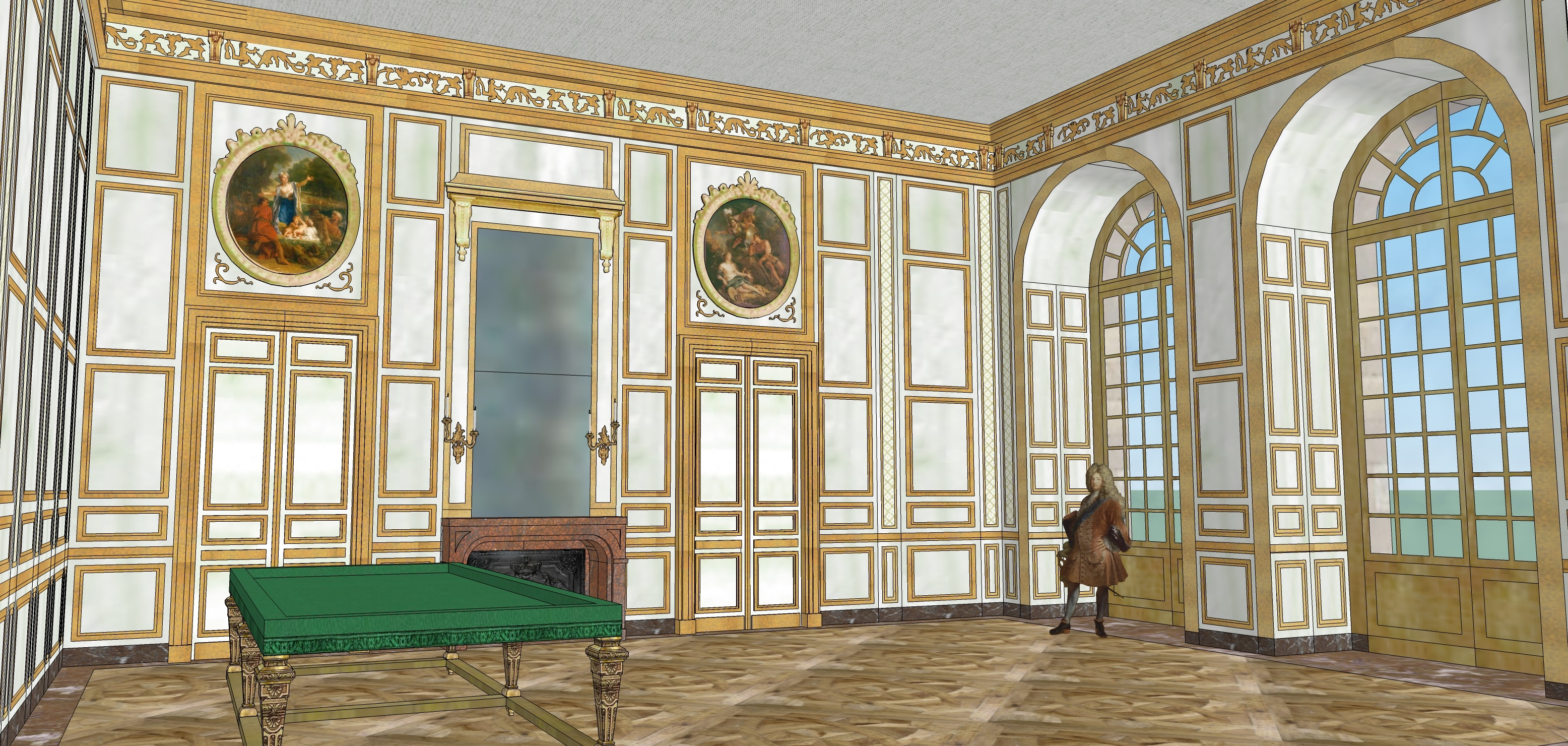 Schéma de restitution du salon du billard de Monseigneur, du Grand Appartement du Dauphin au rez-de-chaussée du château-vieux de Meudon, vers 1700.